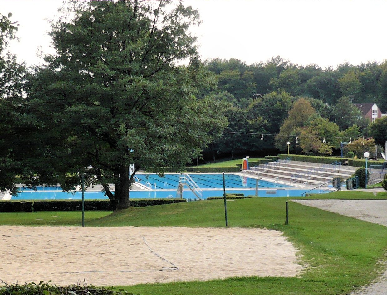 Schwimmzentrum in Essen-Kettwig, Außenanlage